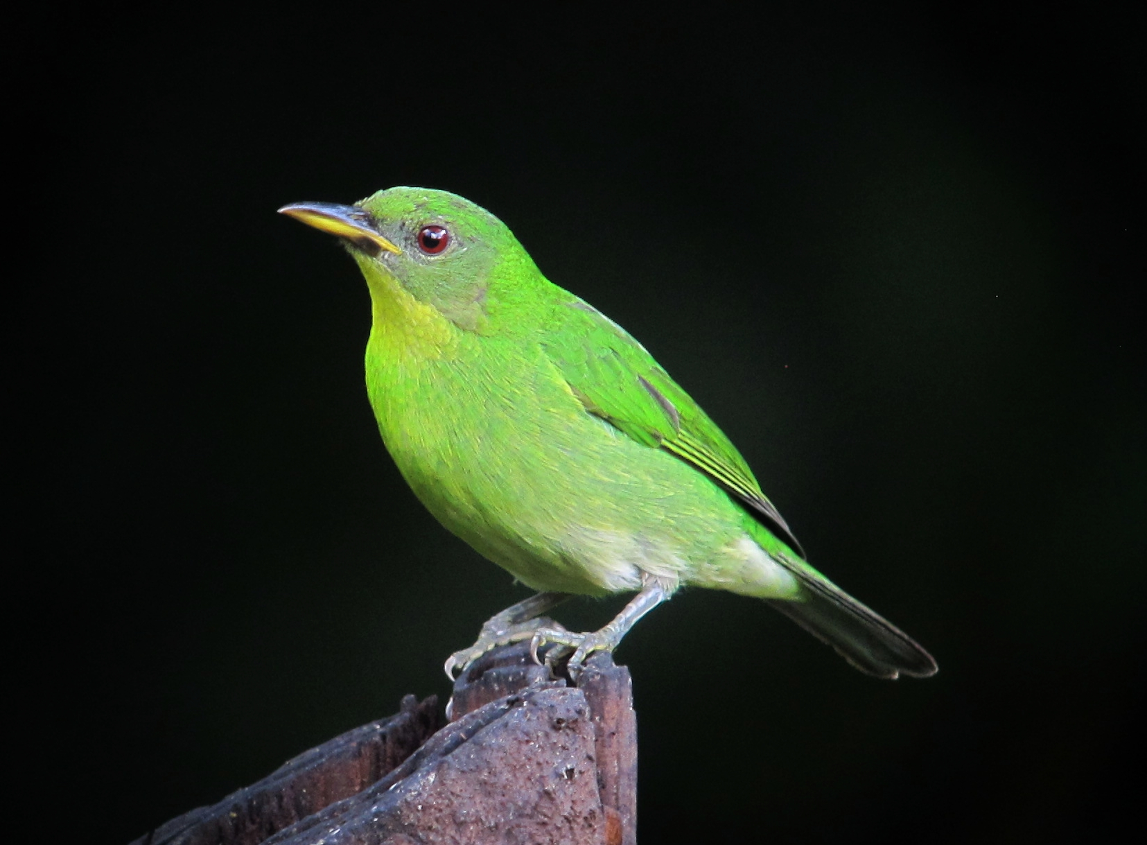 Cali, Valle, Colombia (Km. 18 , Finca Alejandría)